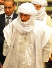 Bilal Ag Achérif à Ouagadougou, le 16 novembre 2012.